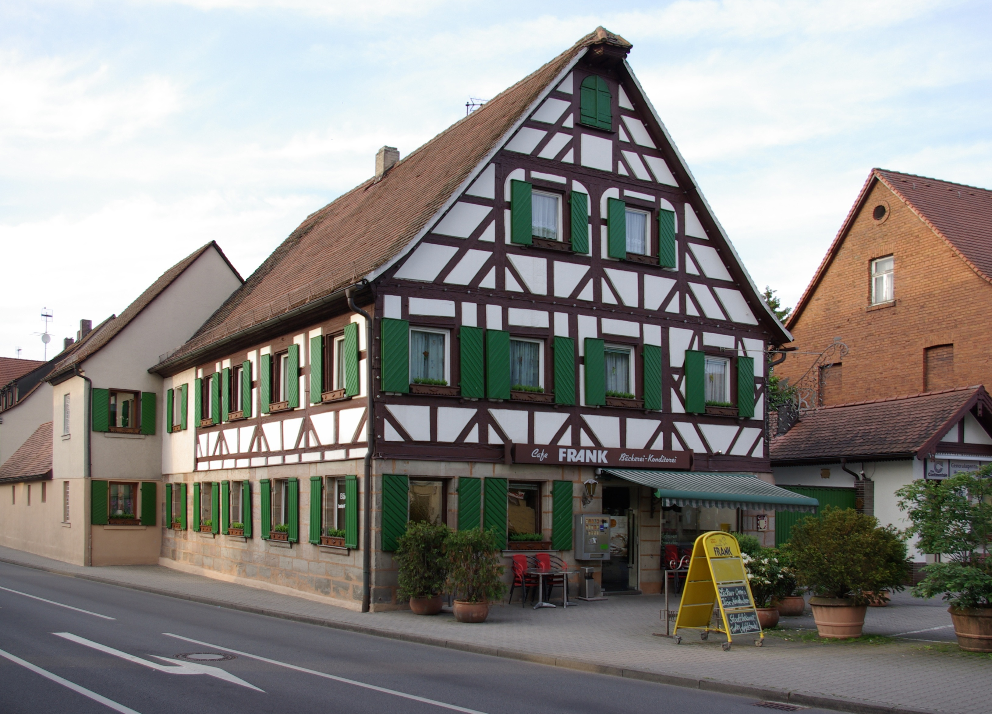 Ehemaliges Gasthaus Zum Goldenen Schiff, Fürther Straße 27 (früher Haus Nr. 95) im Erlanger Stadtteil Bruck